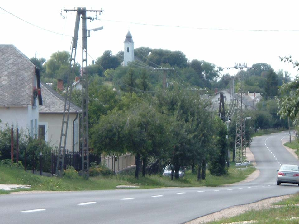 Csetény, Hungary